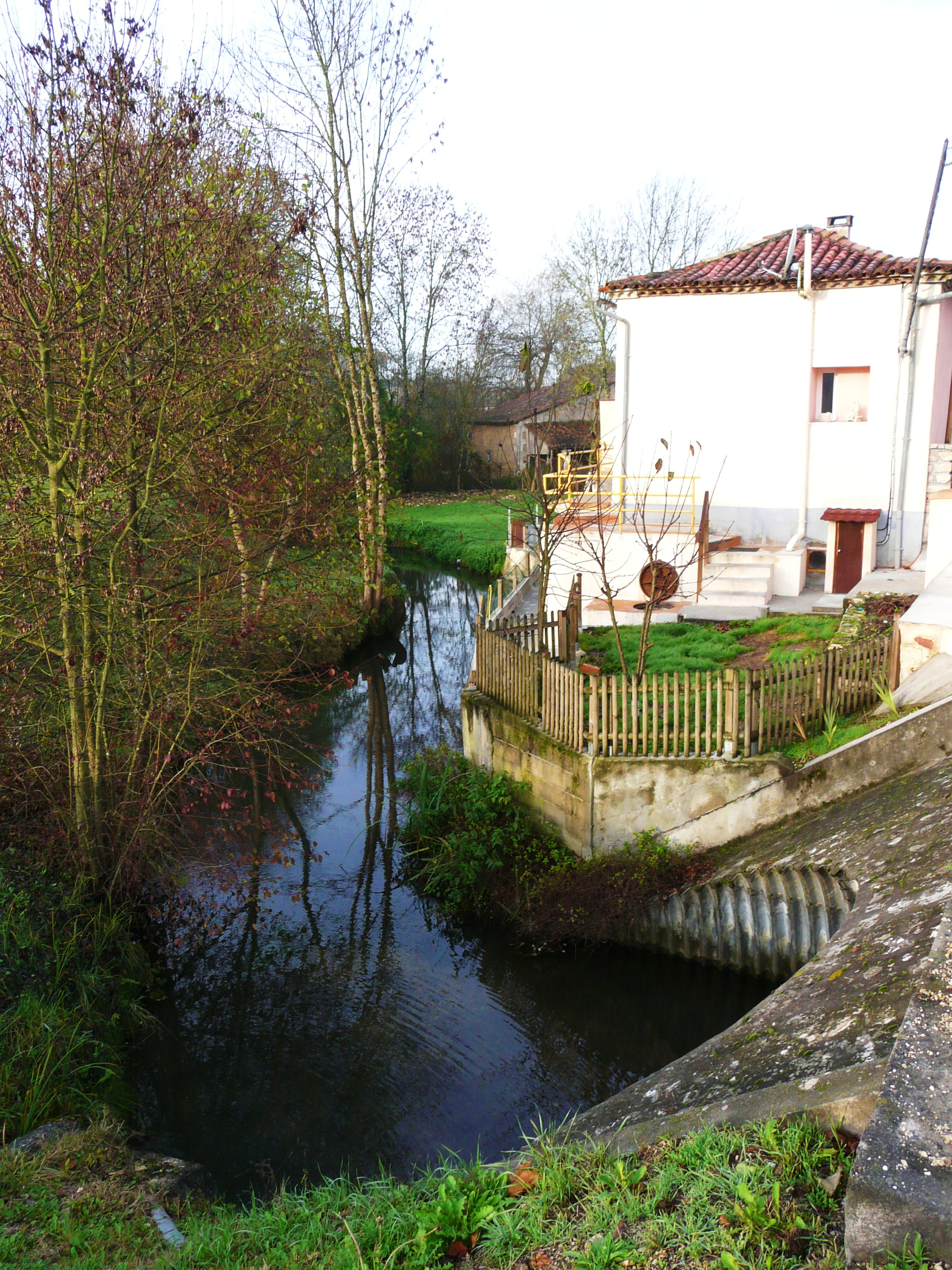 Le Voultron en aval de la route départementale 939 au Pontaroux, Gardes-le-Pontaroux, Charente, France